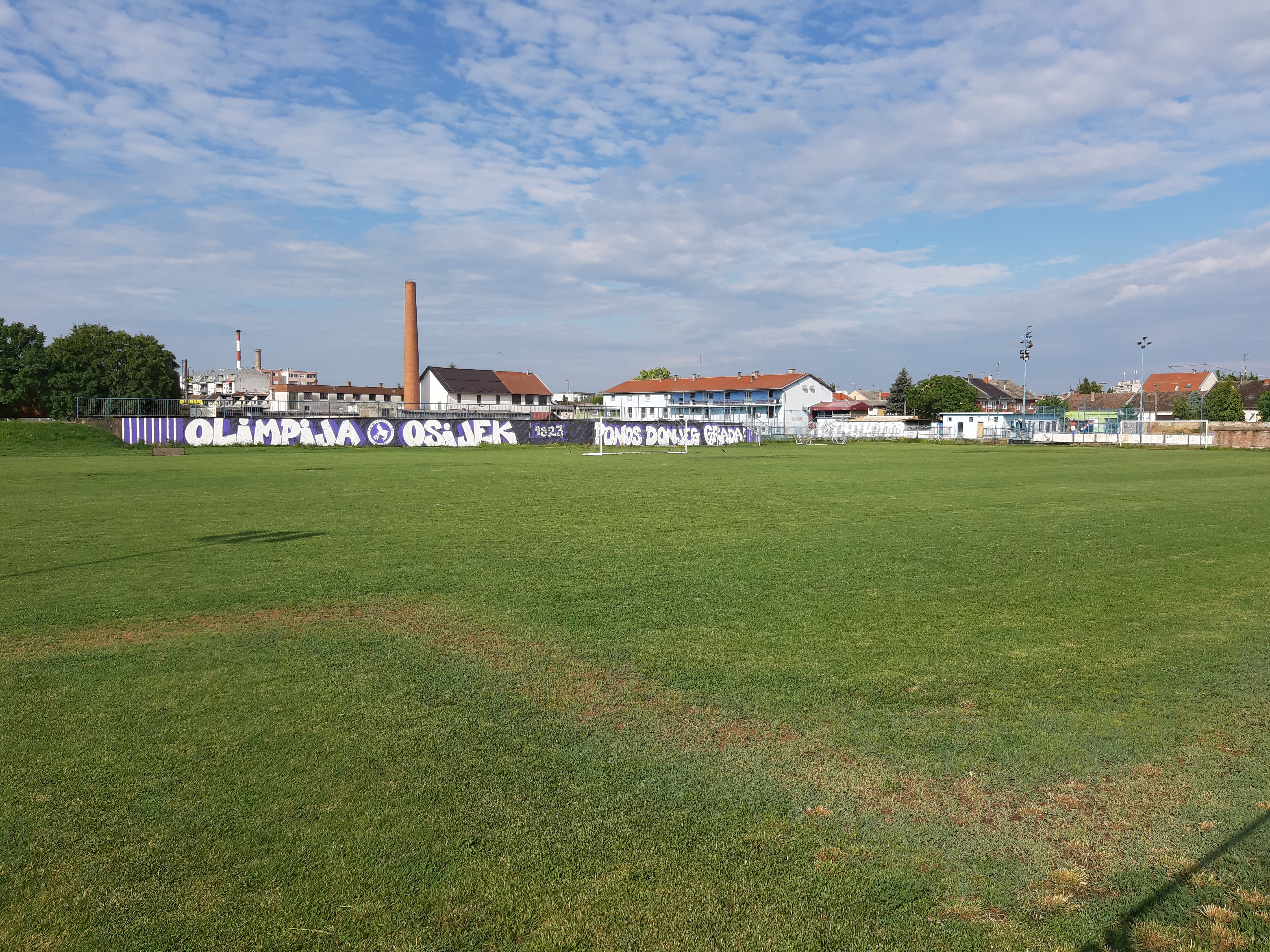 Športski centar Olimpija u Donjem gradu, u Osijeku.